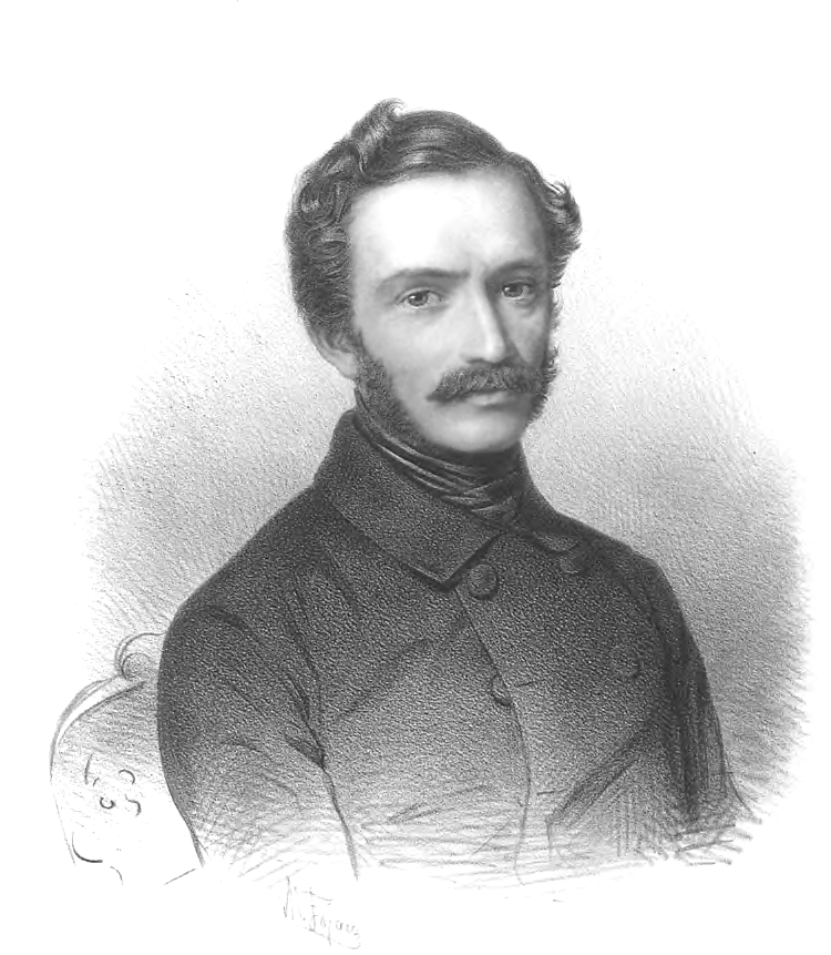 Kazimierz Wójcicki